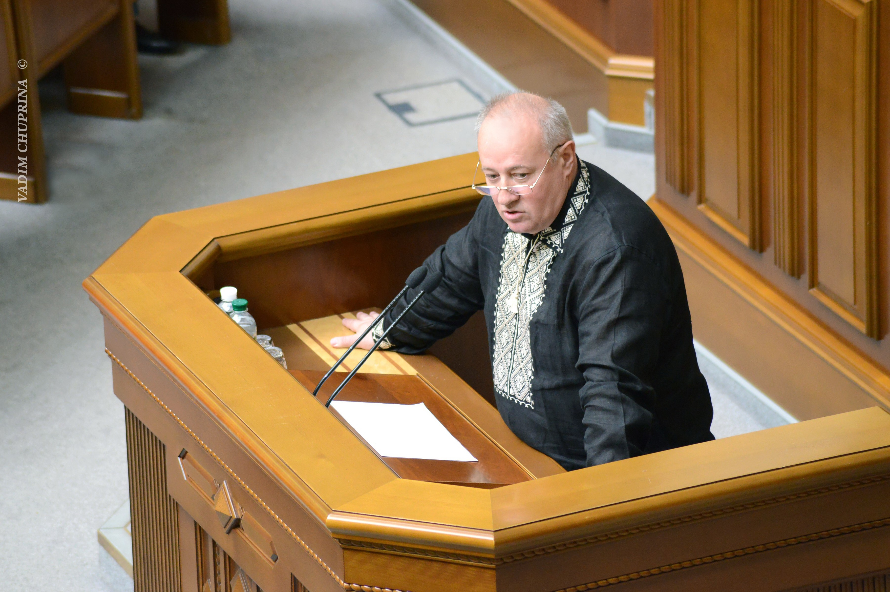 ВЕРХОВНА РАДА УКРАЇНИ 2015 фотограф Вадим Чуприна